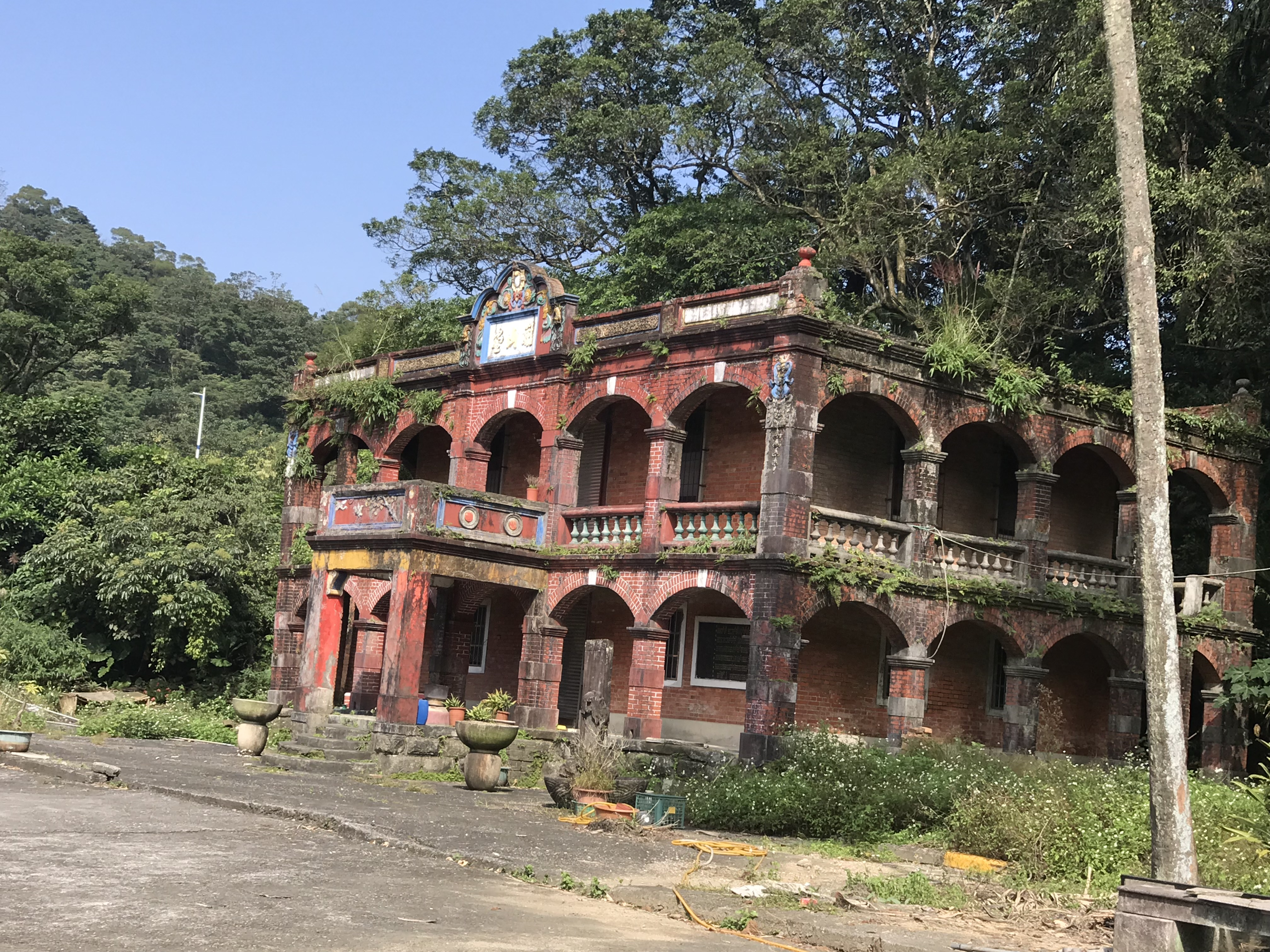 靈泉禪寺開山堂